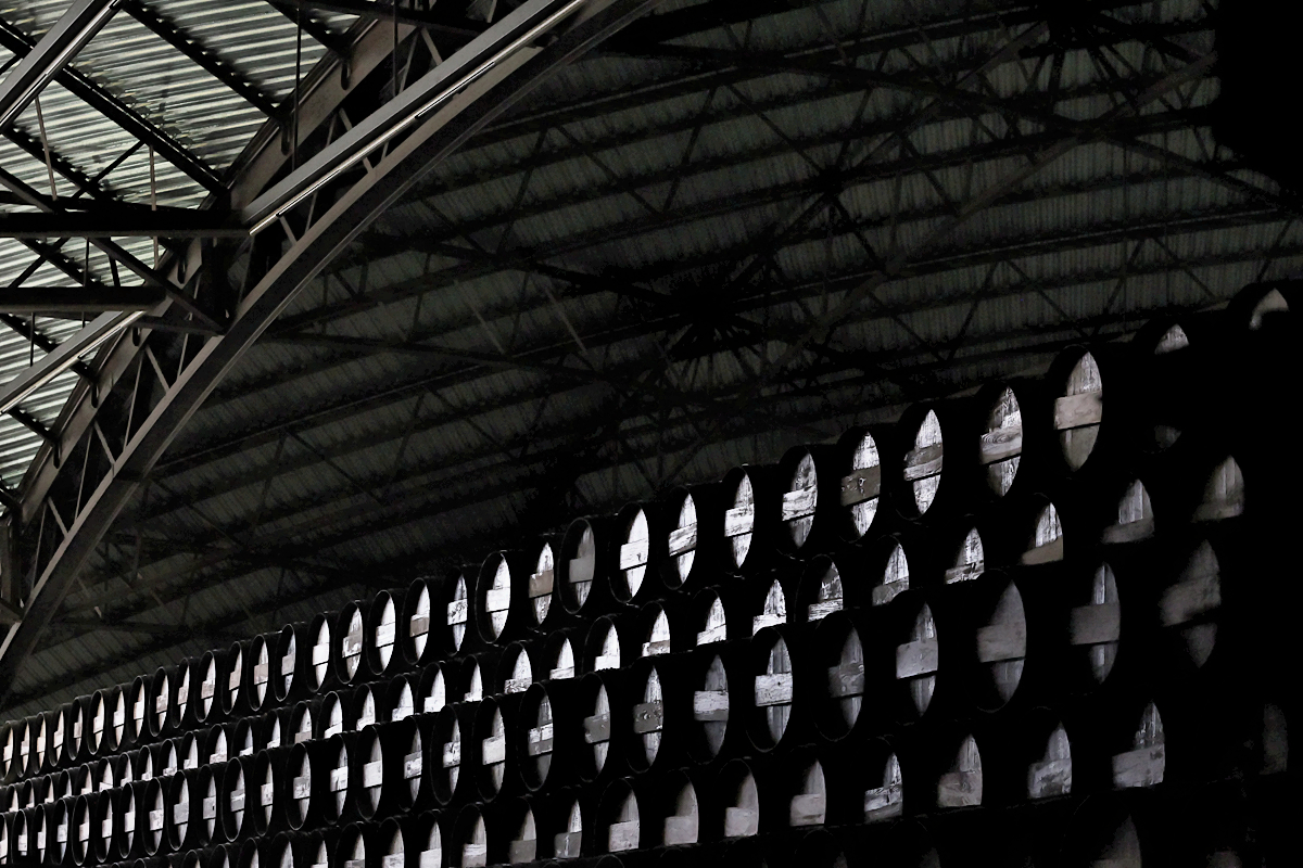 Quinta da Bacalhôa